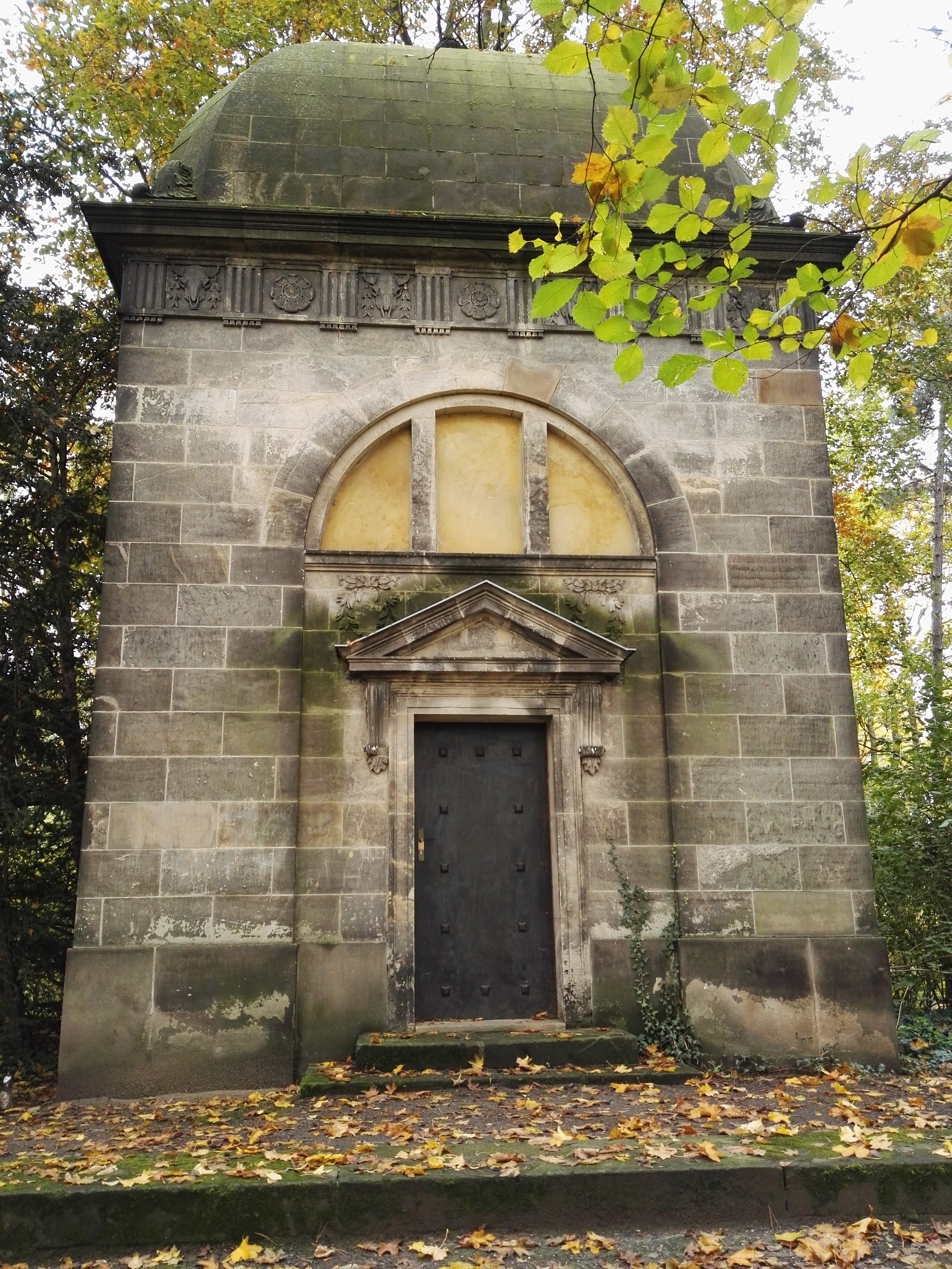 Kolumbarium auf dem Zentralfriefhof Friedrichsfelde; u. a. Urnen von Ernst Vohsen, Karl von den Steinen